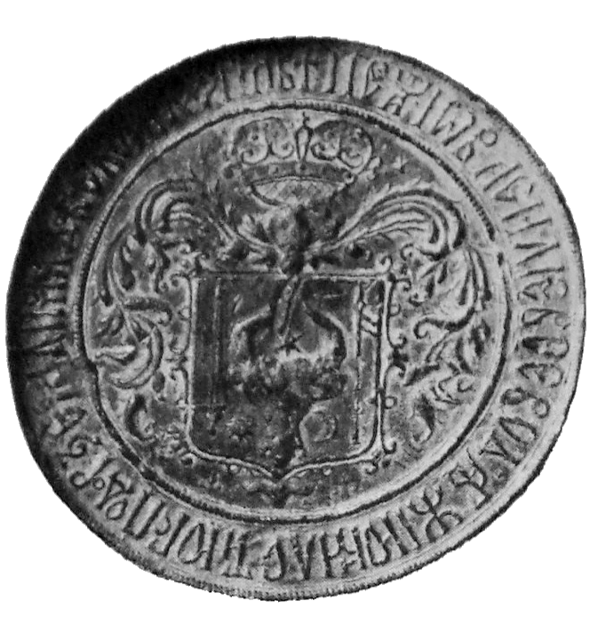 Беларуская (тарашкевіца): Пячатка Васіля Лупу 1641 году.